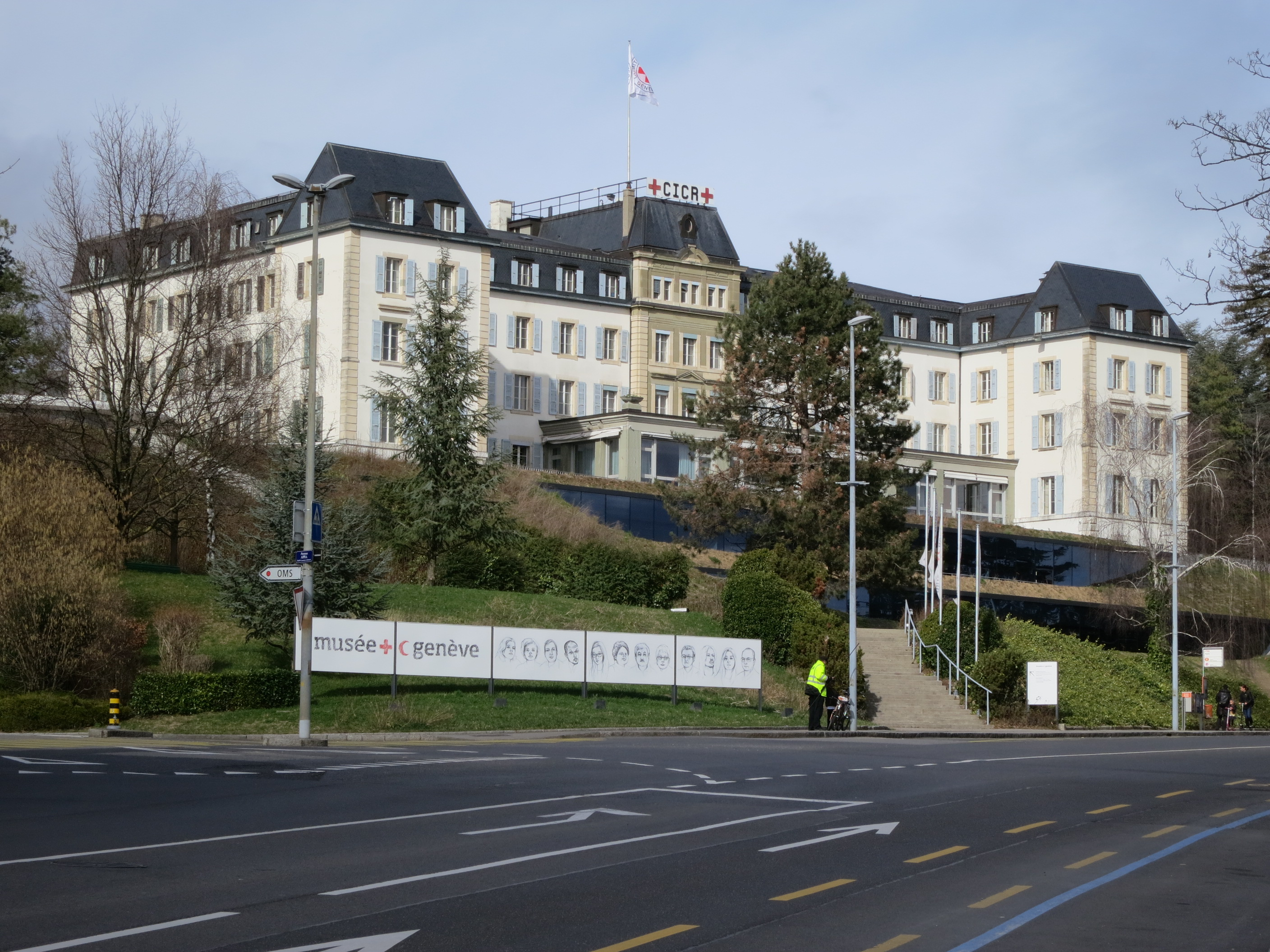 IKRK Hauptsitz, Genf, Schweiz